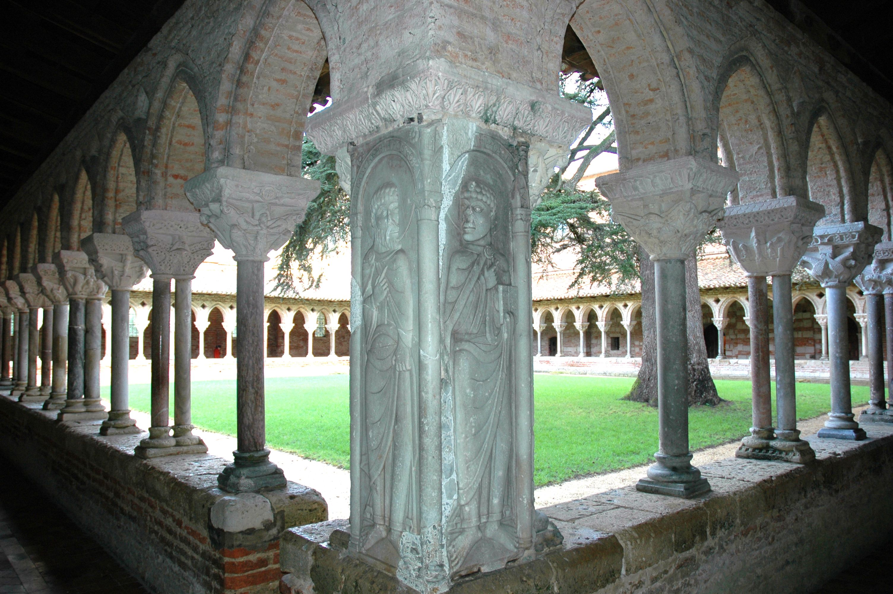 Abadia de Saint-Pierre de Moissac - Claustre, pilier de Saint Matthieu (avec le livre) et Saint Barthelemy (avec la barbe).